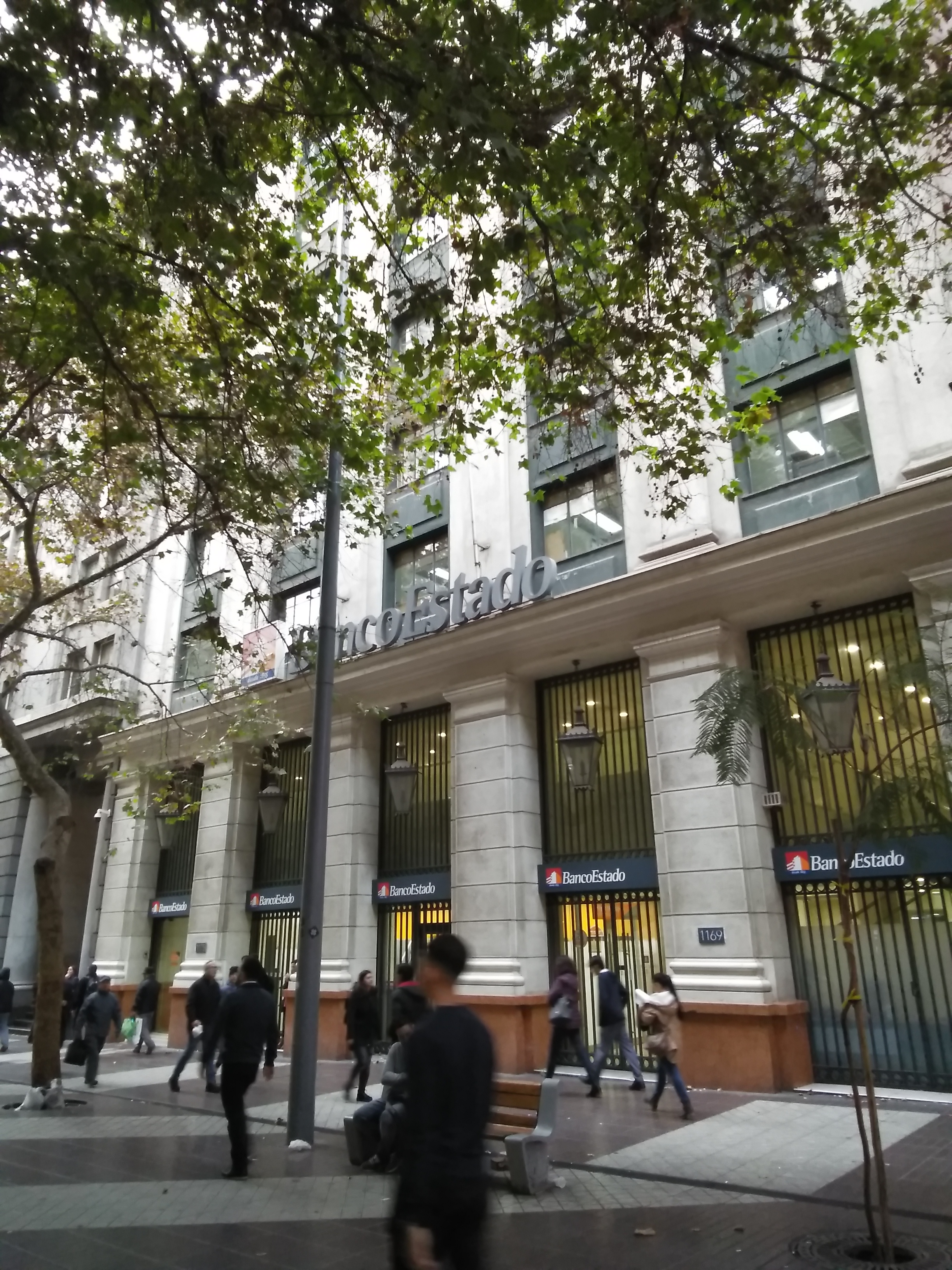 Sucursal de BancoEstado en calle Huérfanos (Santiago de Chile). Entre 1981 y 1982 fue la sucursal principal del Banco Austral de Chile.